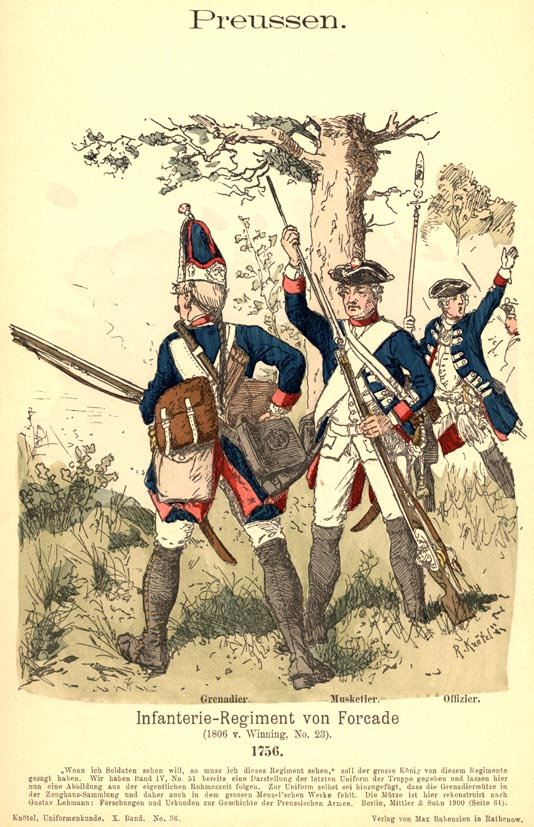 Иллюстрация Рихарда Кнотеля